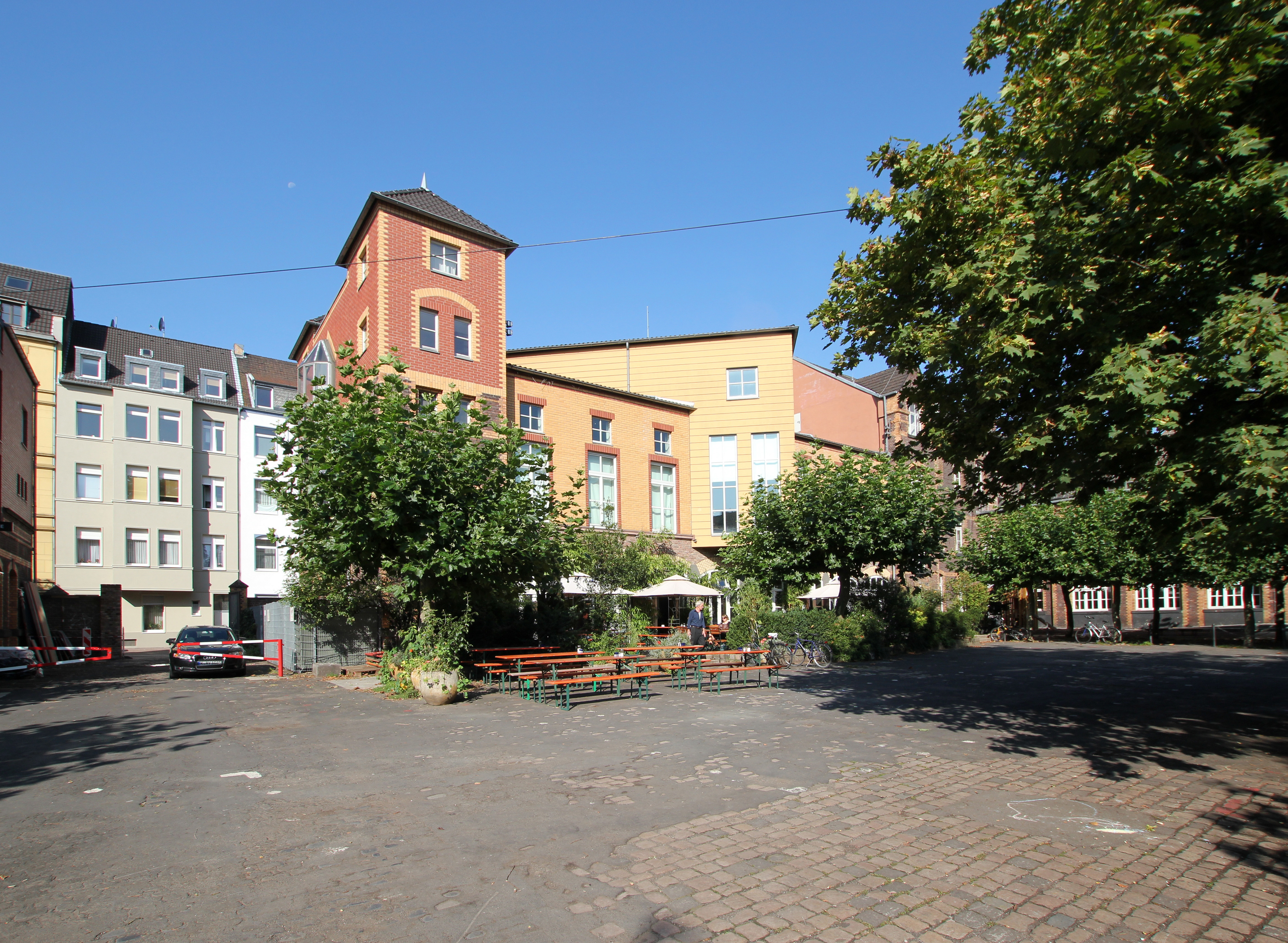 Köln-Neustadt-Nord, Melchiorstr. 3. Reste der alten Feuerwache